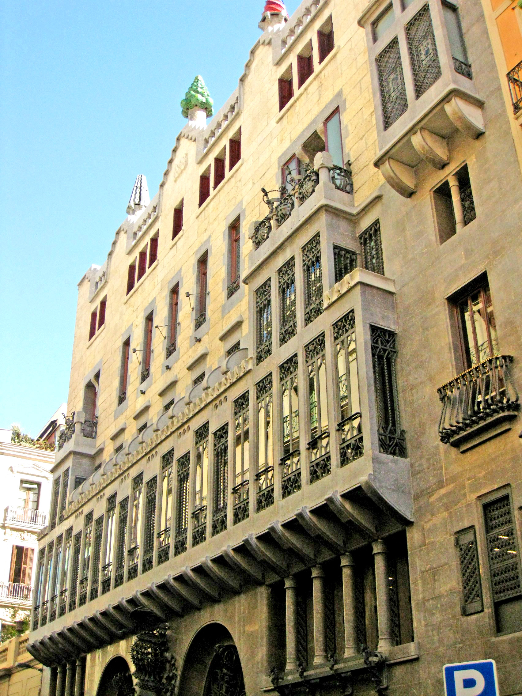 Palau Güell, edifici modernista construït per Antoni Gaudí (1885-89) com a residència particular d'Eusebi Güell, considerat Patrimoni de la Humanitat per la UNESCO el 1985. Situat al carrer Nou de la Rambla núm. 3-5, al barri del Raval (Barcelona).